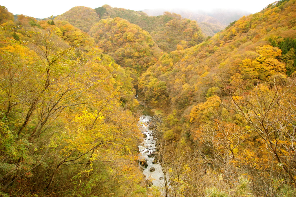 Hekigyokukei, a famous "Koyo" valley in Miyagi.